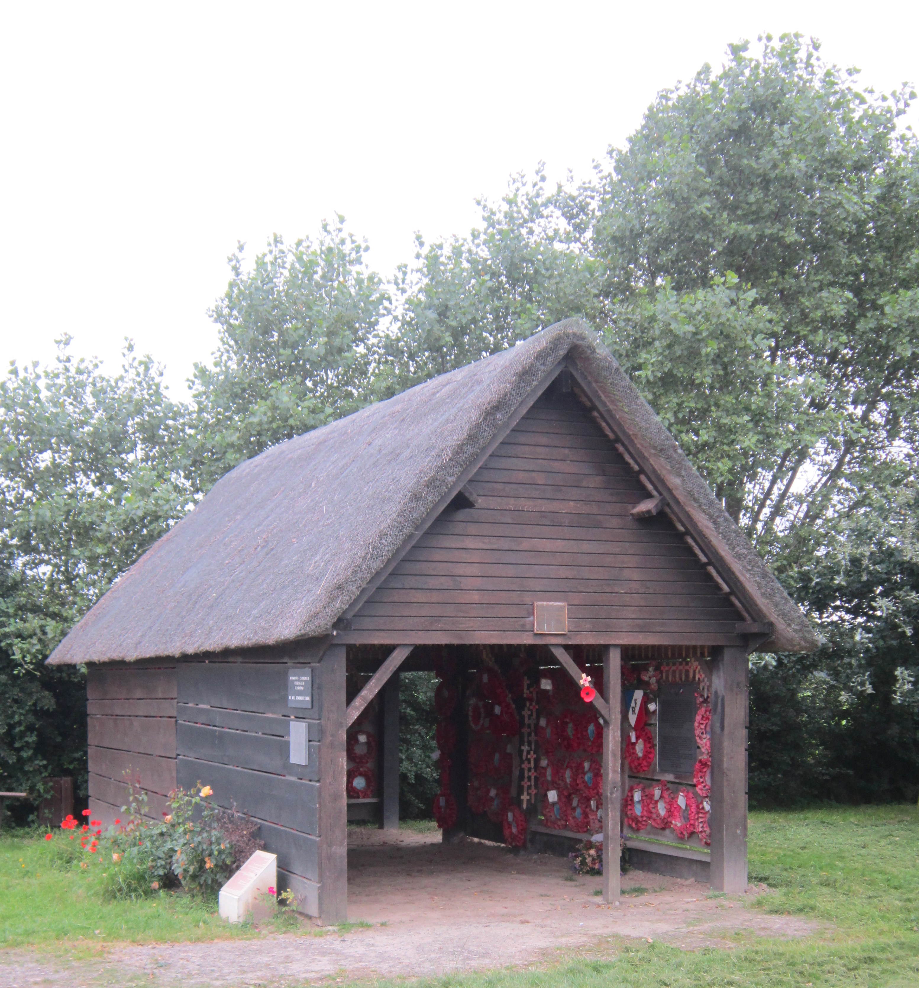 Al lab (ur c'hraouig-saout) bet adsavet e plas an hini a-gent e La Plaine au Bois, e kumun Eskelbeke, ha n'eo ket e Wormhout, dep. an Norzh, Flandrez Frañs; eno e voe drouklazhet prizonidi-brezel gant ar Waffen SS (Lazhadeg La Plaine au Bois), d'an 28 a viz Mae 1940.